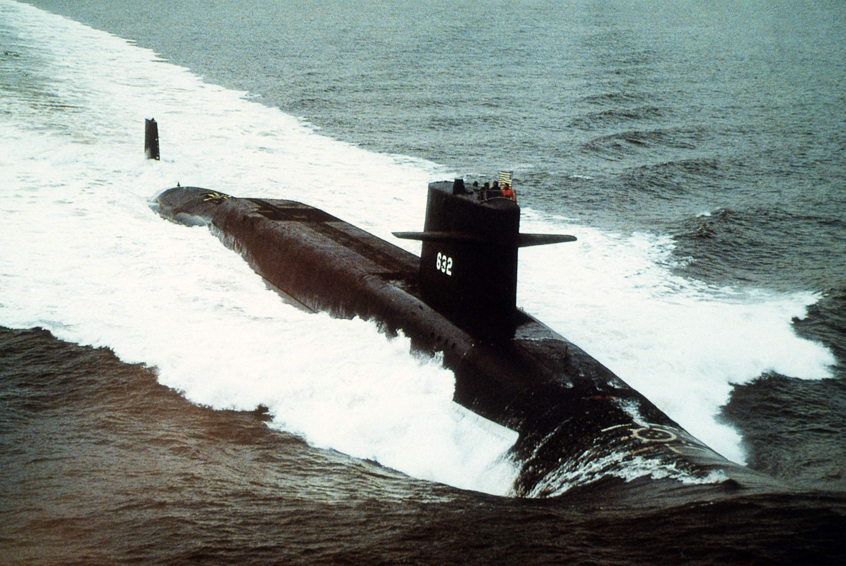 USS Von Steuben (SSBN-632) US Navy photograph #DN-SC-86-00447